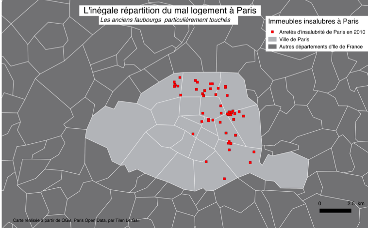 Arrêtés particulièrement présents aux emplacements des anciens faubourgs parisiens.